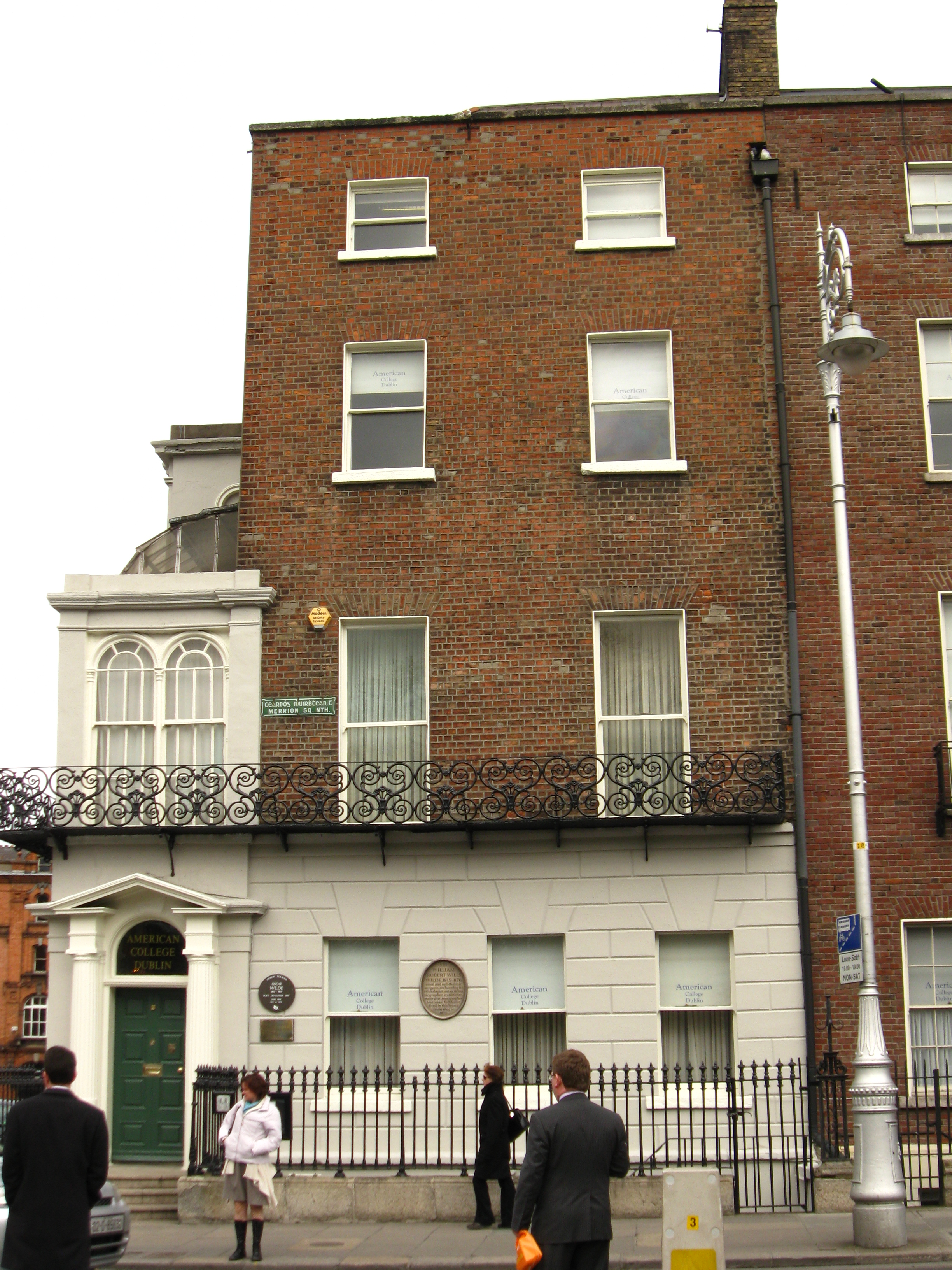 Kuća Oskara Vajlda, Dublin.